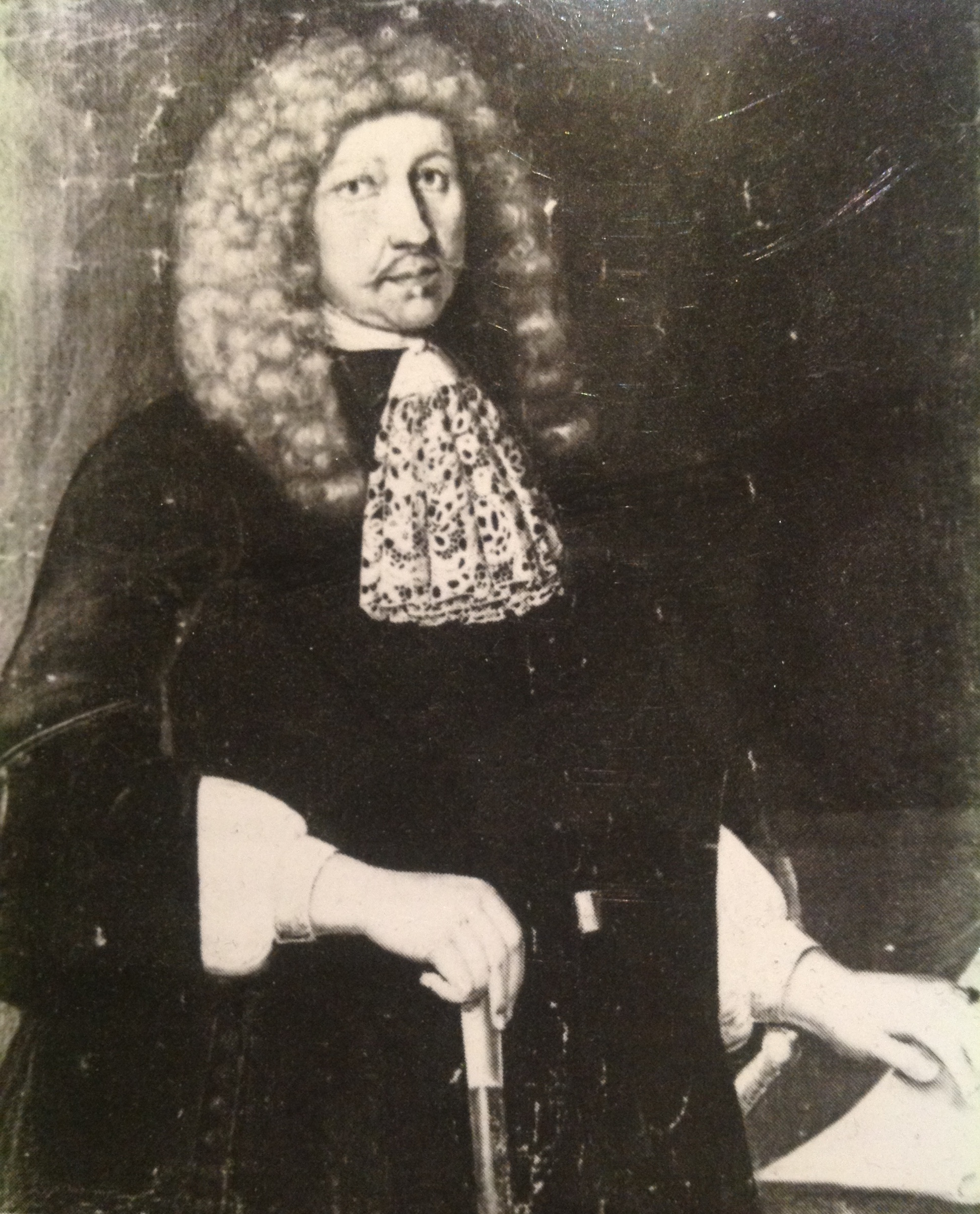 Preben von Ahnen